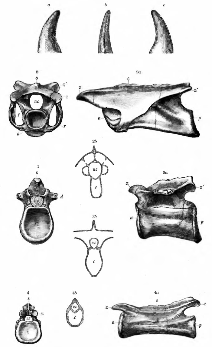 Vertebrae of Coelurus